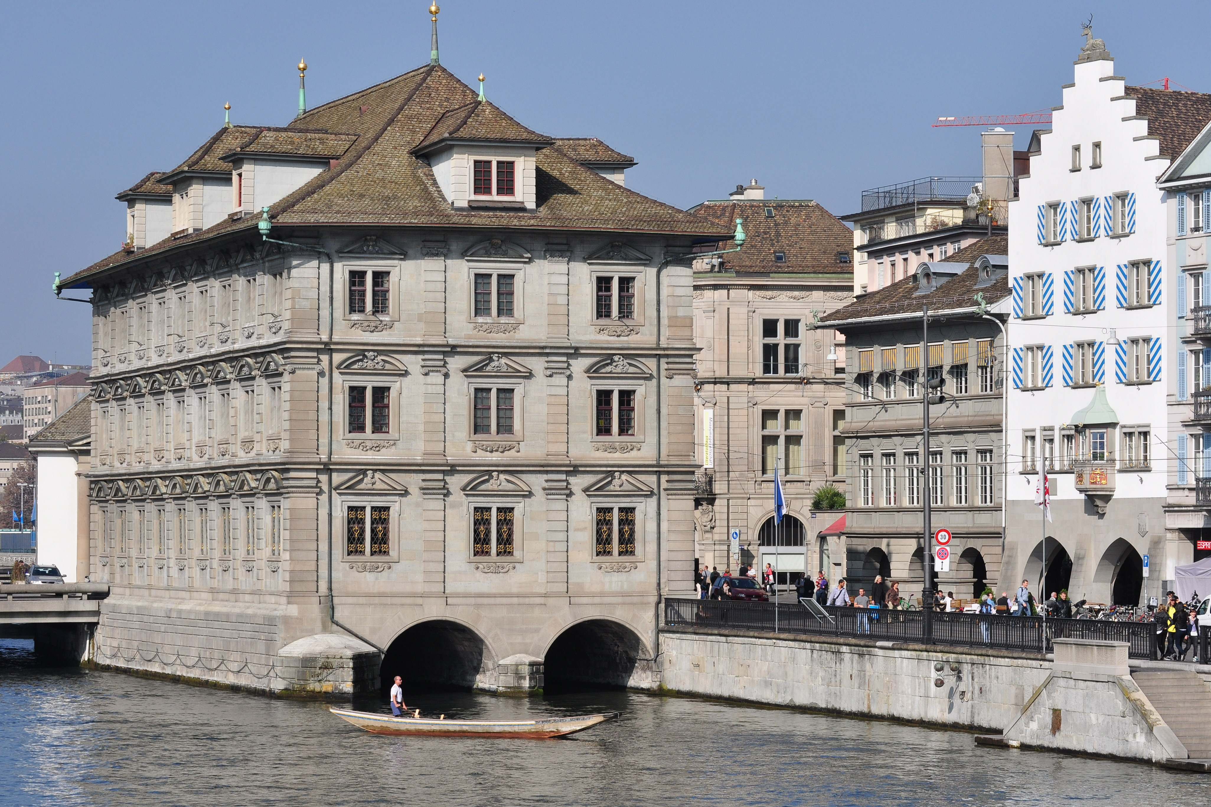 Limmatquai, Rathaus and Zunfthaus zur Haue in Zürich (Switzerland), as seen from Wühre towards Münsterhof